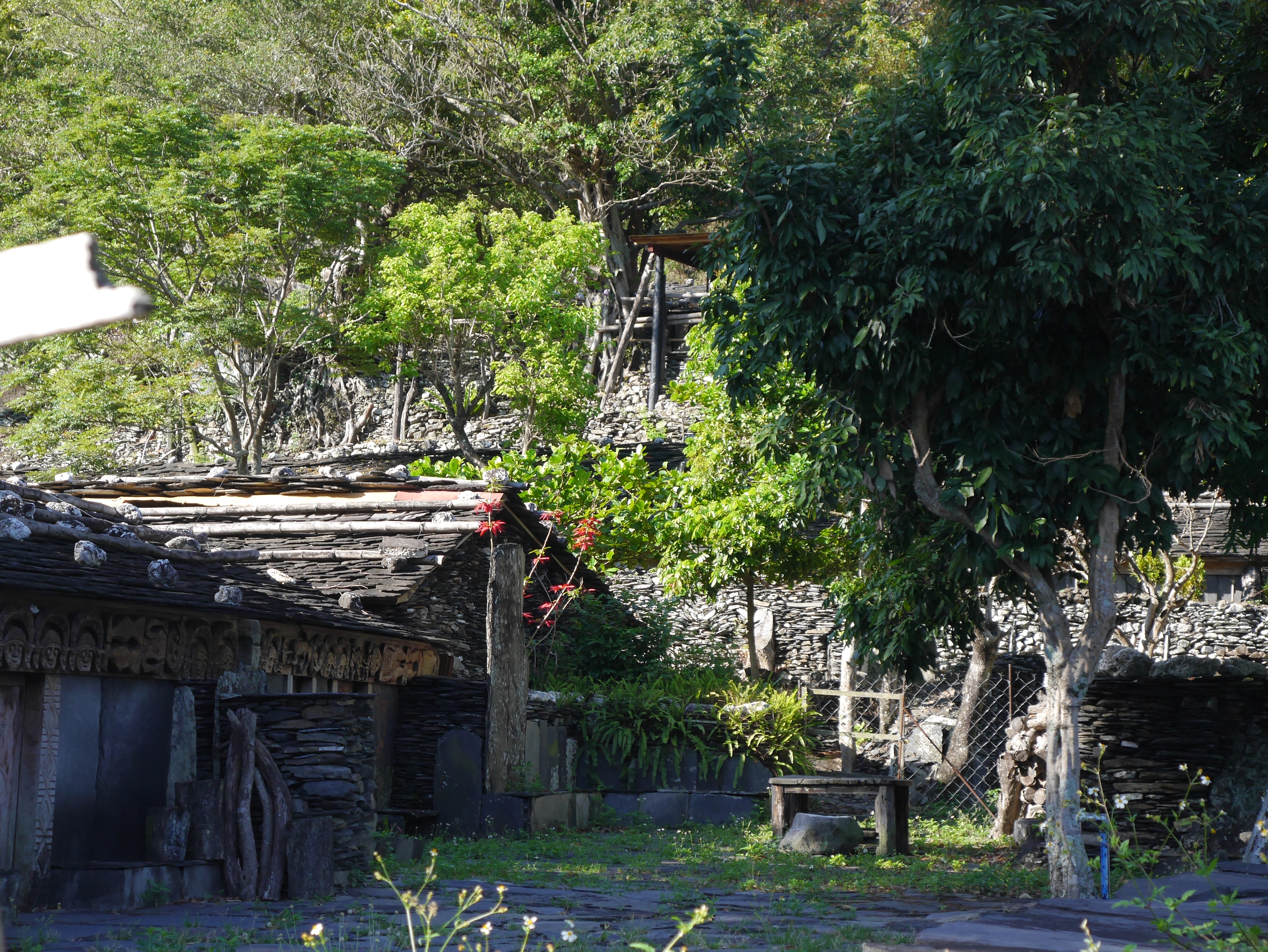 中文（台灣）: 石板屋 老七佳 部落 排灣族 原住民